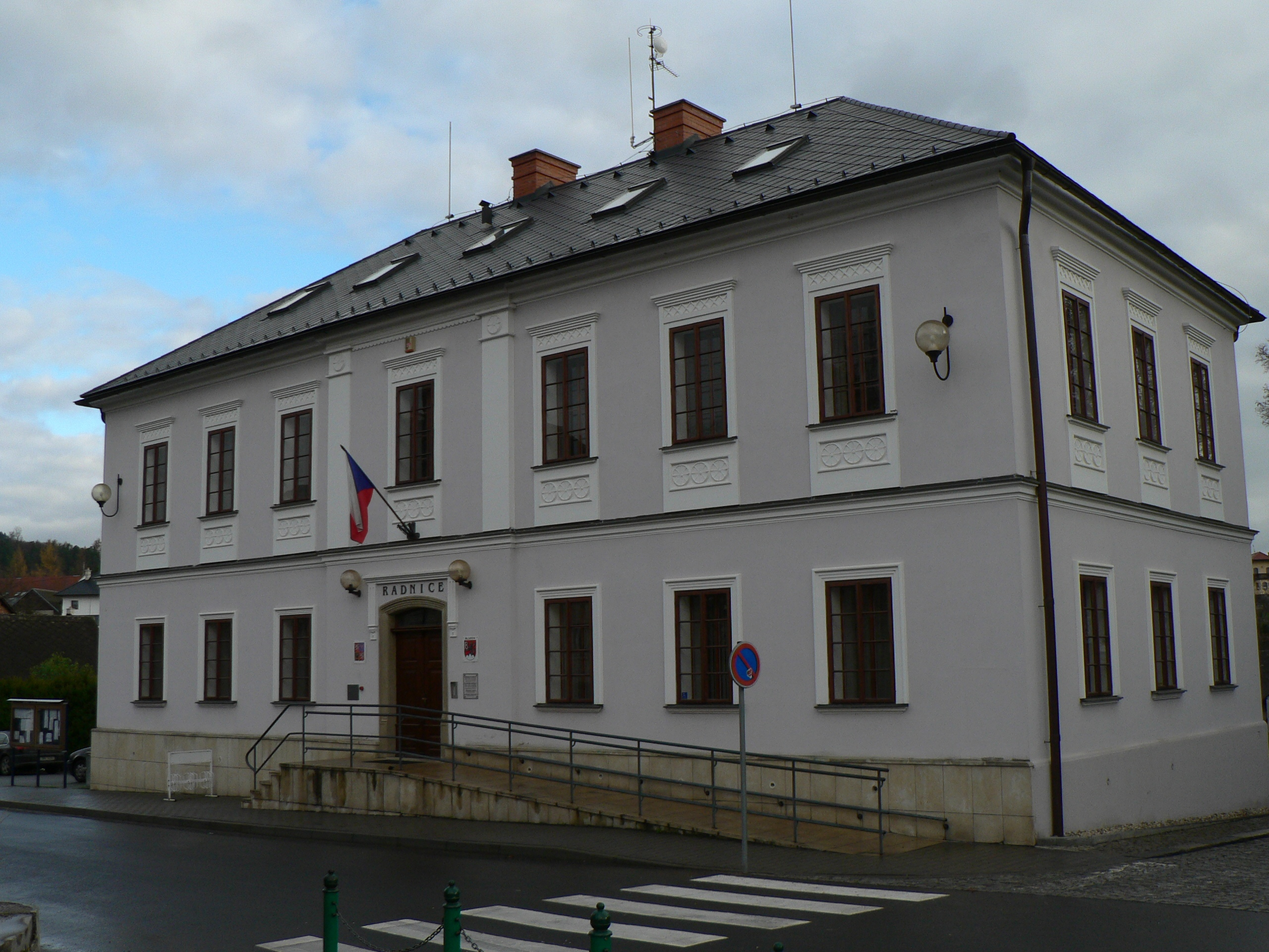 Bludov, radnice